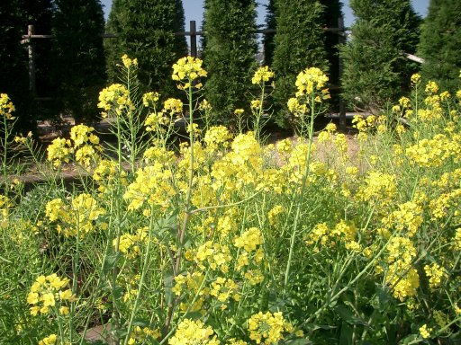 Brassica rapa var. nippo-oleifera。アブラナ